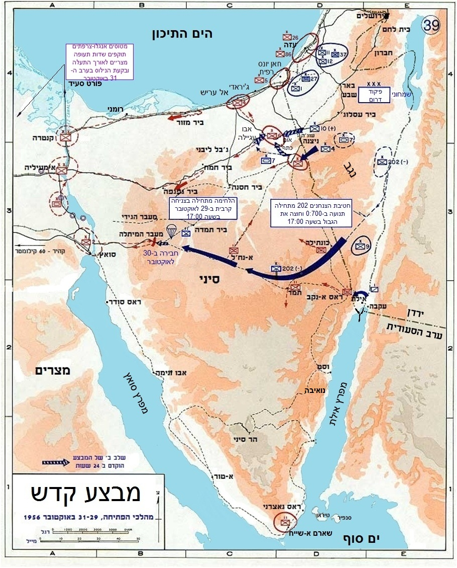 המהלכים הראשונים של מלחמת סיני